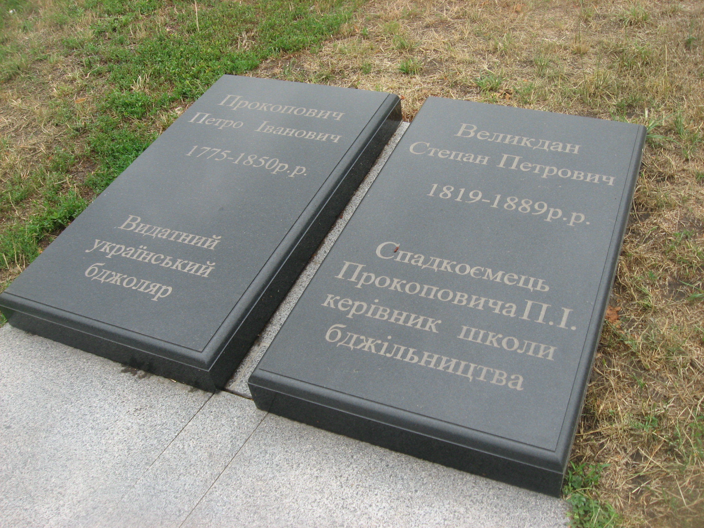 Меморіальна дошка біля села Пальчики на могилі П.І. Прокоповича, засновника вітчизняної науки про бджільництво, винахідника рамкового вулика